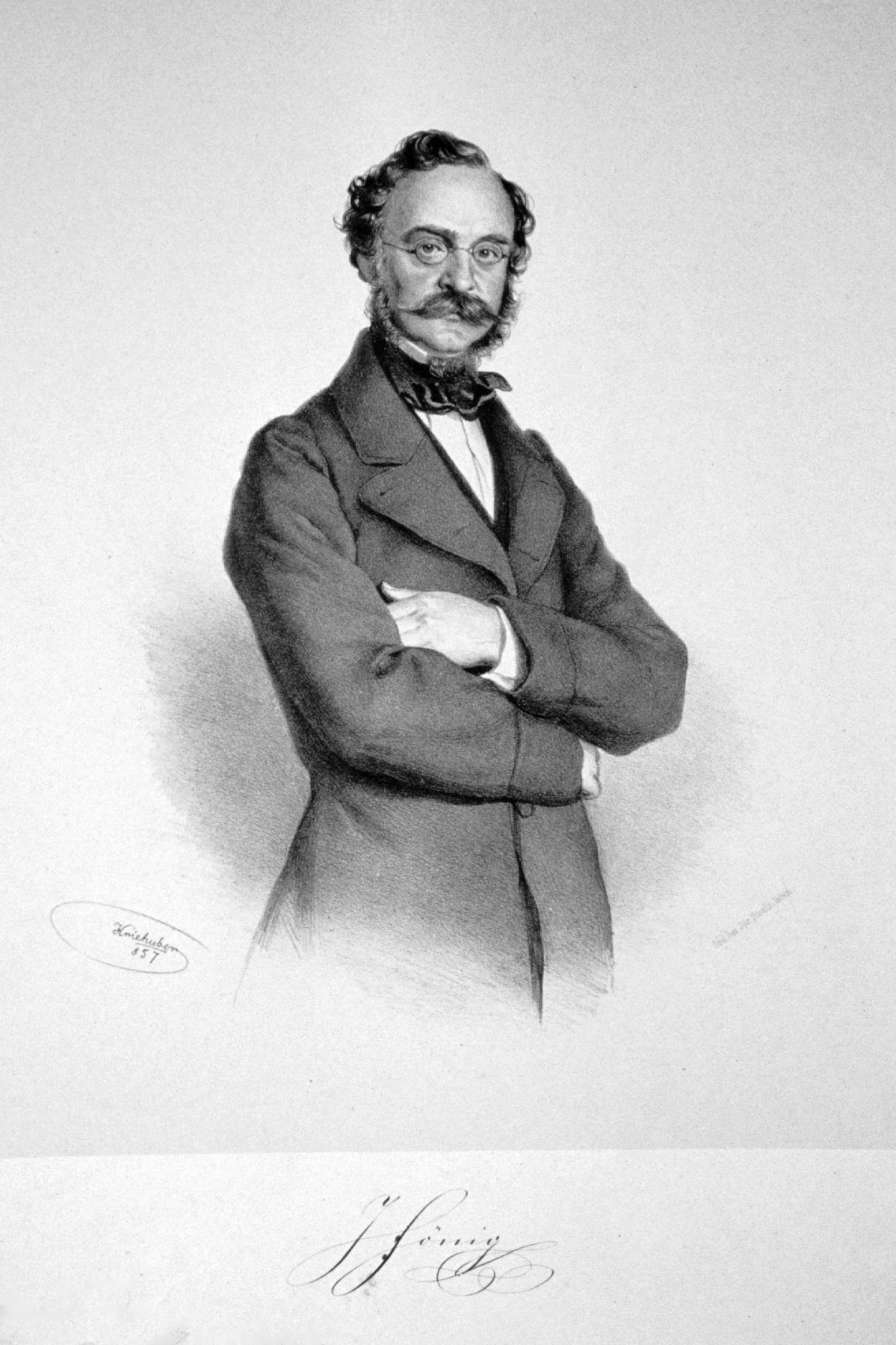 Johann Hönig (1810-1886), Professor an der Bergakademie in Schemnitz und im Studienjahr 1868/69 Rektor der Technischen Universität Wien. Lithographie von Josef Kriehuber, 1857